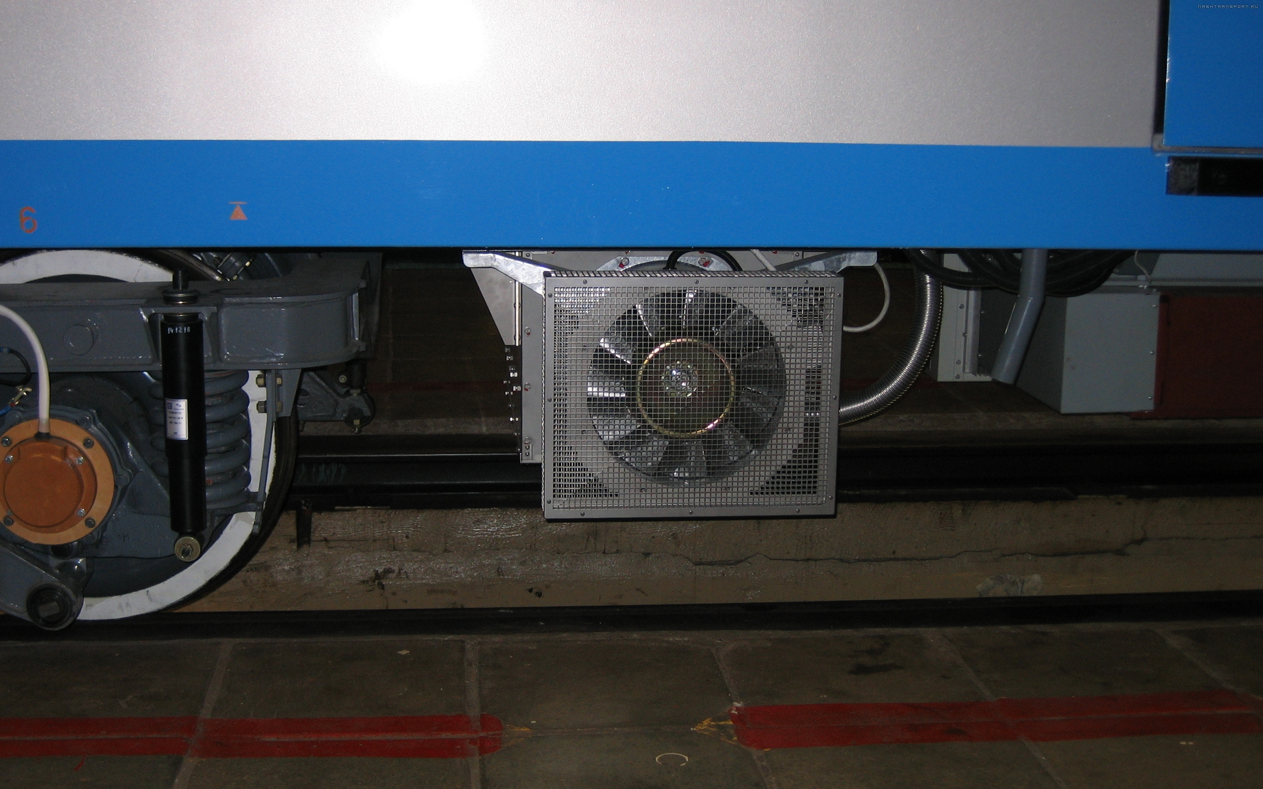 Вентилятор тормозного резистора в подвагонном пространстве электропоезда метро 81-760-761